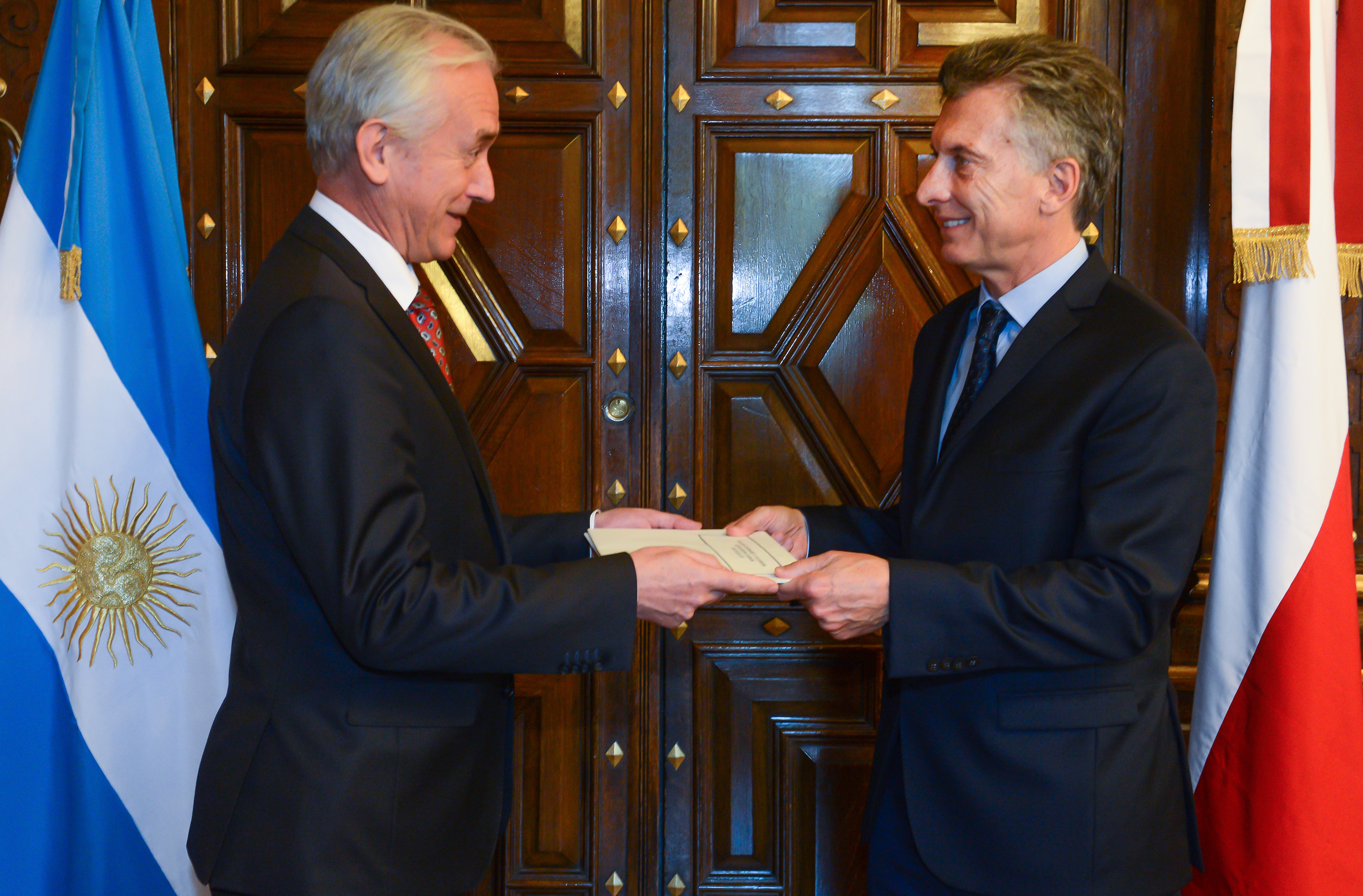 El presidente Mauricio Macri recibió ayer las cartas credenciales de los embajadores de Rumania, Noruega, Eslovenia, Polonia, Serbia, Nueva Zelandia y de la Unión Europea. El acto se realizó este mediodía en el despacho presidencial, donde también asistió la canciller Susana Malcorra. Presentaron sus cartas Carmen Liliana Podgorean (Rumania); Jostein Leiro (Reino de Noruega); Jadranka Šturm Kocjan (Eslovenia); Marek Pernal (Polonia); Jela Bacovic (Serbia); Raylene Liufalani (Nueva Zelanda) y José Ignacio Salafranca (Delegación de la Unión Europea).